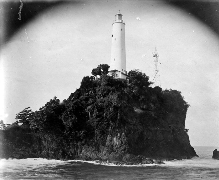 Repronegatief. Vuurtoren, Java's 1e punt